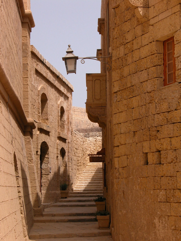 Victoria, Gozo Foto scattata da Stefano Trezzi e rilasciata sotto Creative Commons.